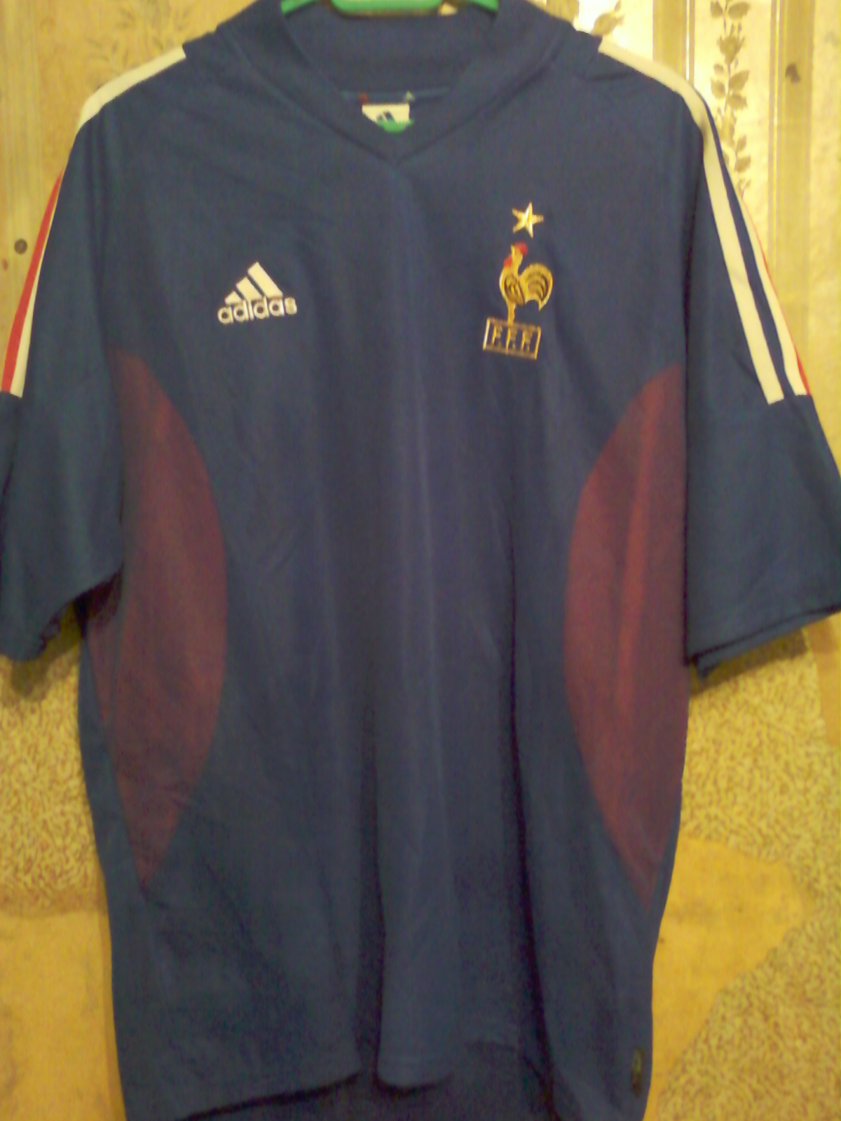 Maillot domicile de l'équipe de France 2002-2003